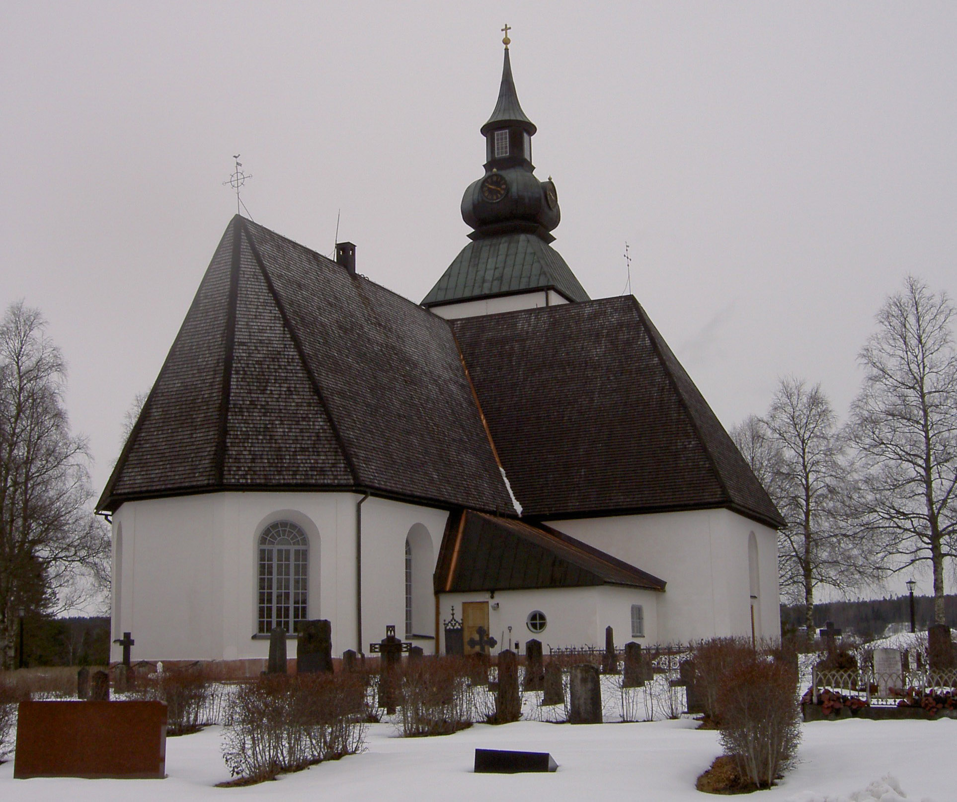 Malungs kyrka/church, Malung, Sverige/Sweden